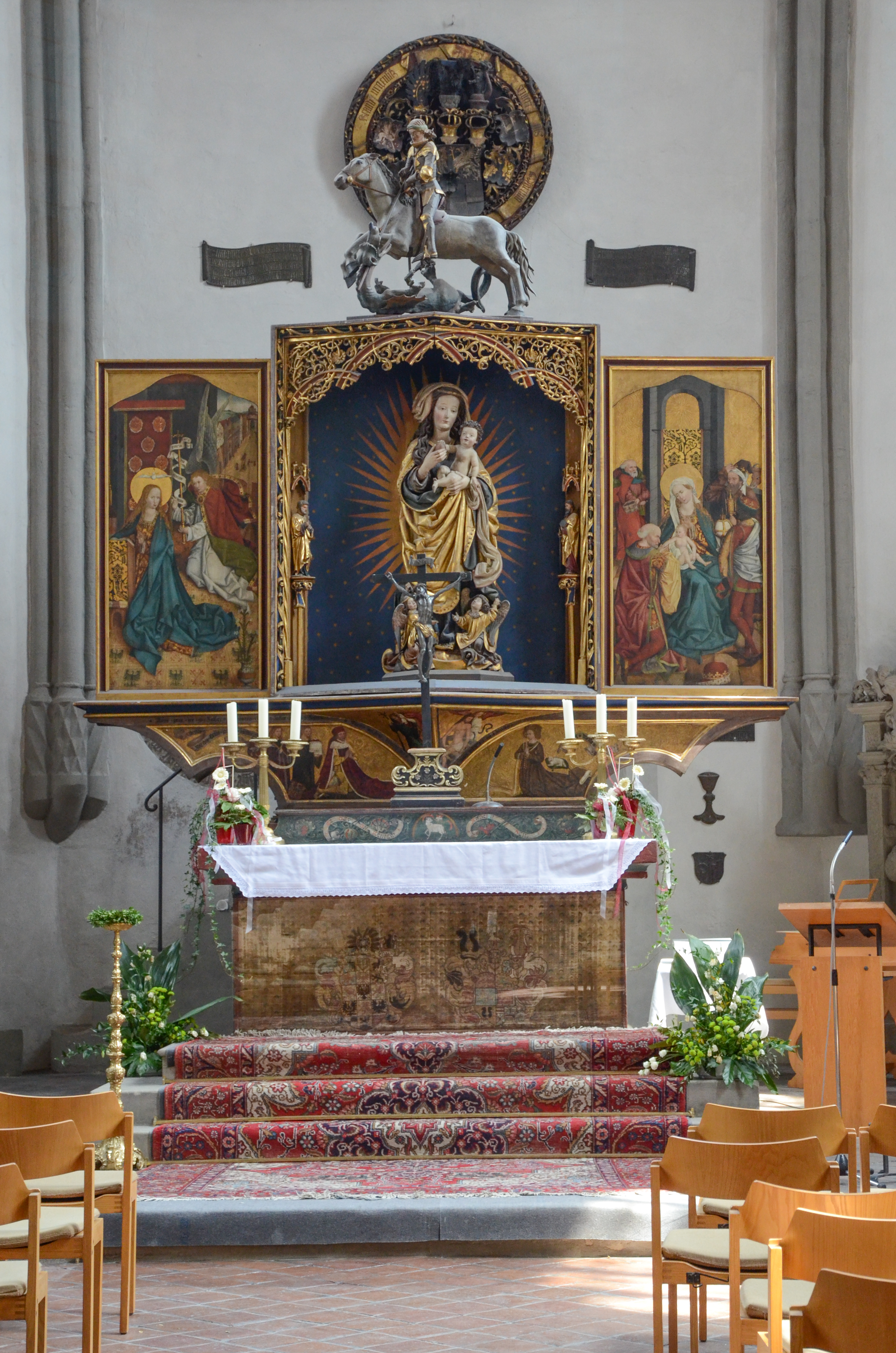 evang.-luth. Kirche St. Gumbertus in Ansbach, Schwanenritterkapelle